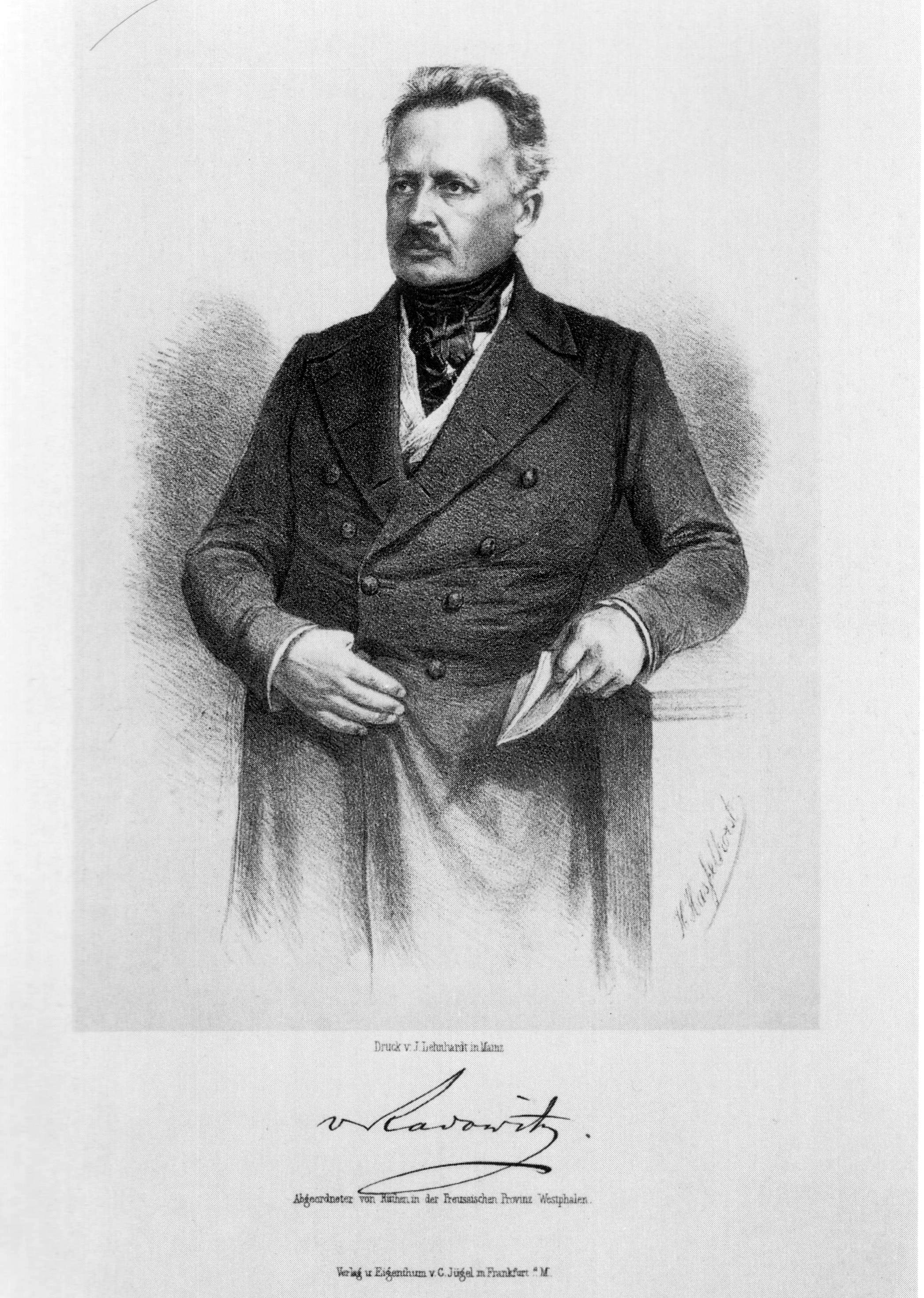 Lithographie, um 1848/1849, Heinrich Hasselhorst. “Joseph von Radowitz”.